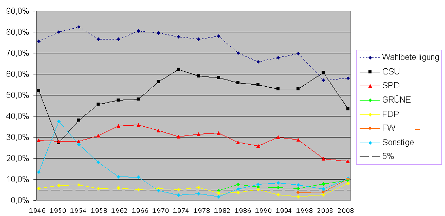 Prozentuelle Entwicklung der Landtagswahlen seit 1946 (import from de 2011-08-18)